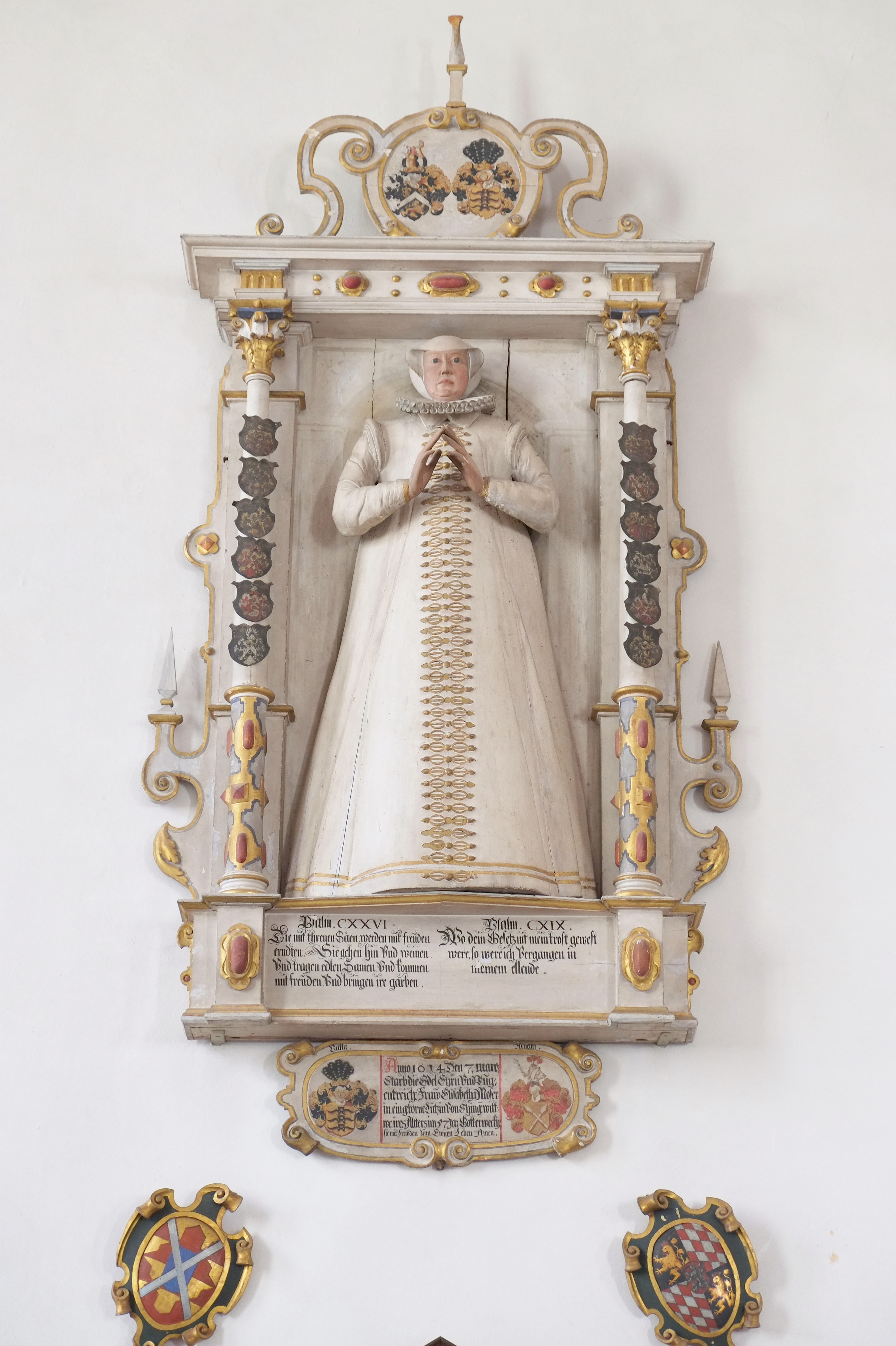 Evangelische Kirche St. Jakob in Oettingen in Bayern (Bayern), Holzepitaph für Elisabeth Moser geb. Luz